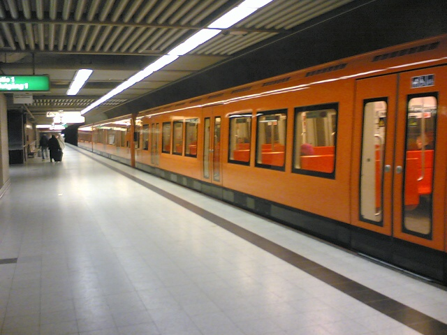 Metrojuna Rautatientorin metroasemalla.